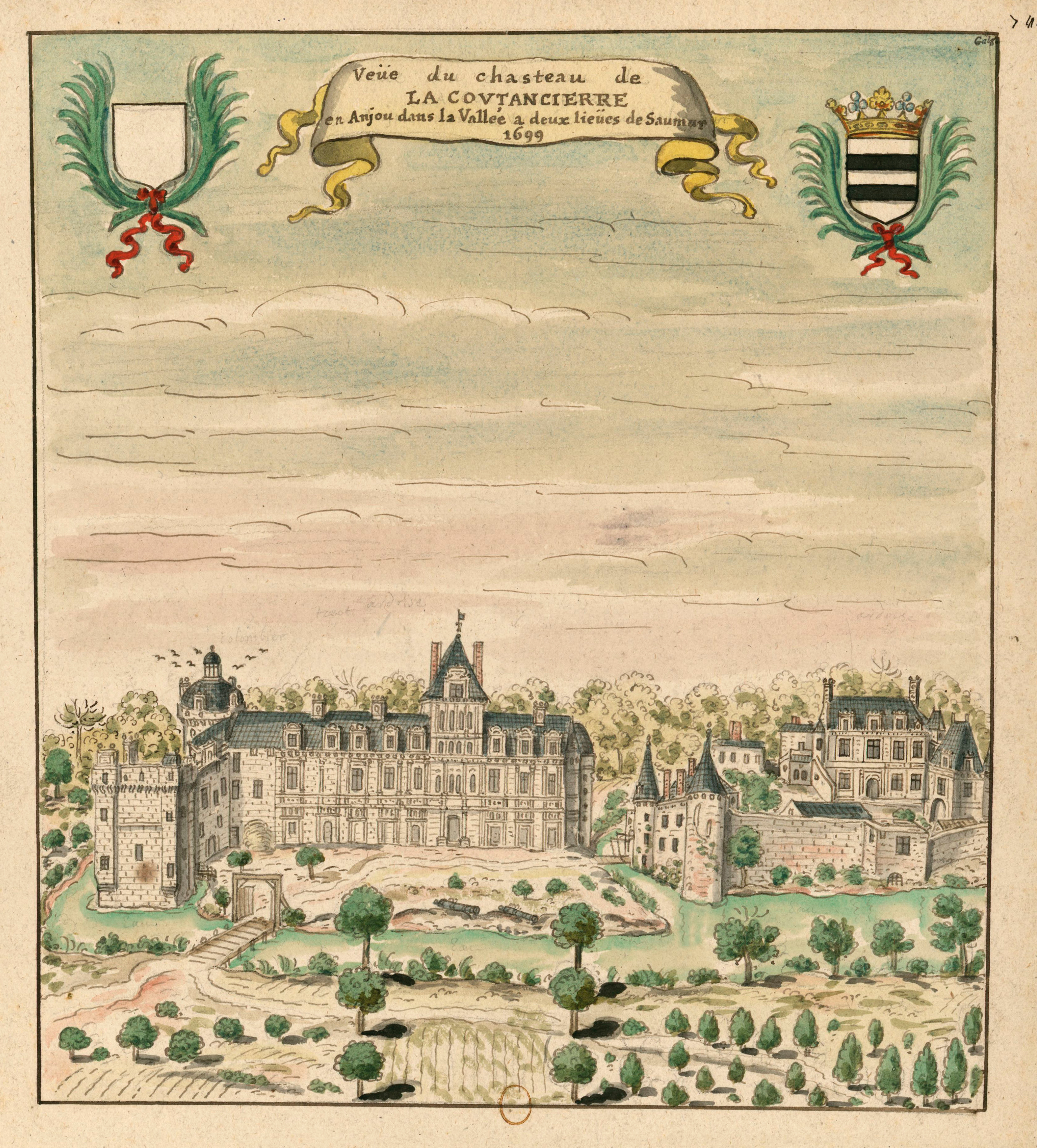 Vue du château de la Coutancière. Aquarelle de Louis Boudan, collection de François Roger de Gaignières, 1699.